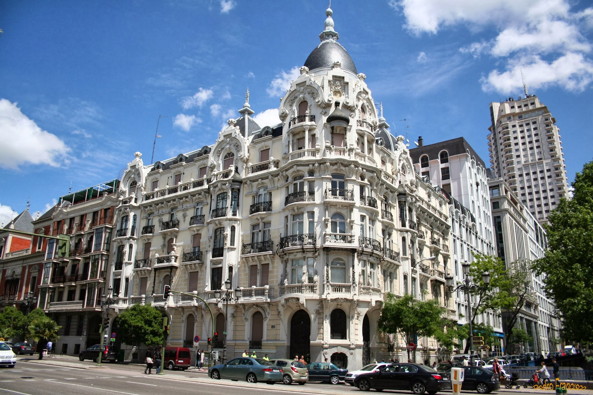 Casa Gallardo-Pza España esquina Ferraz(1)